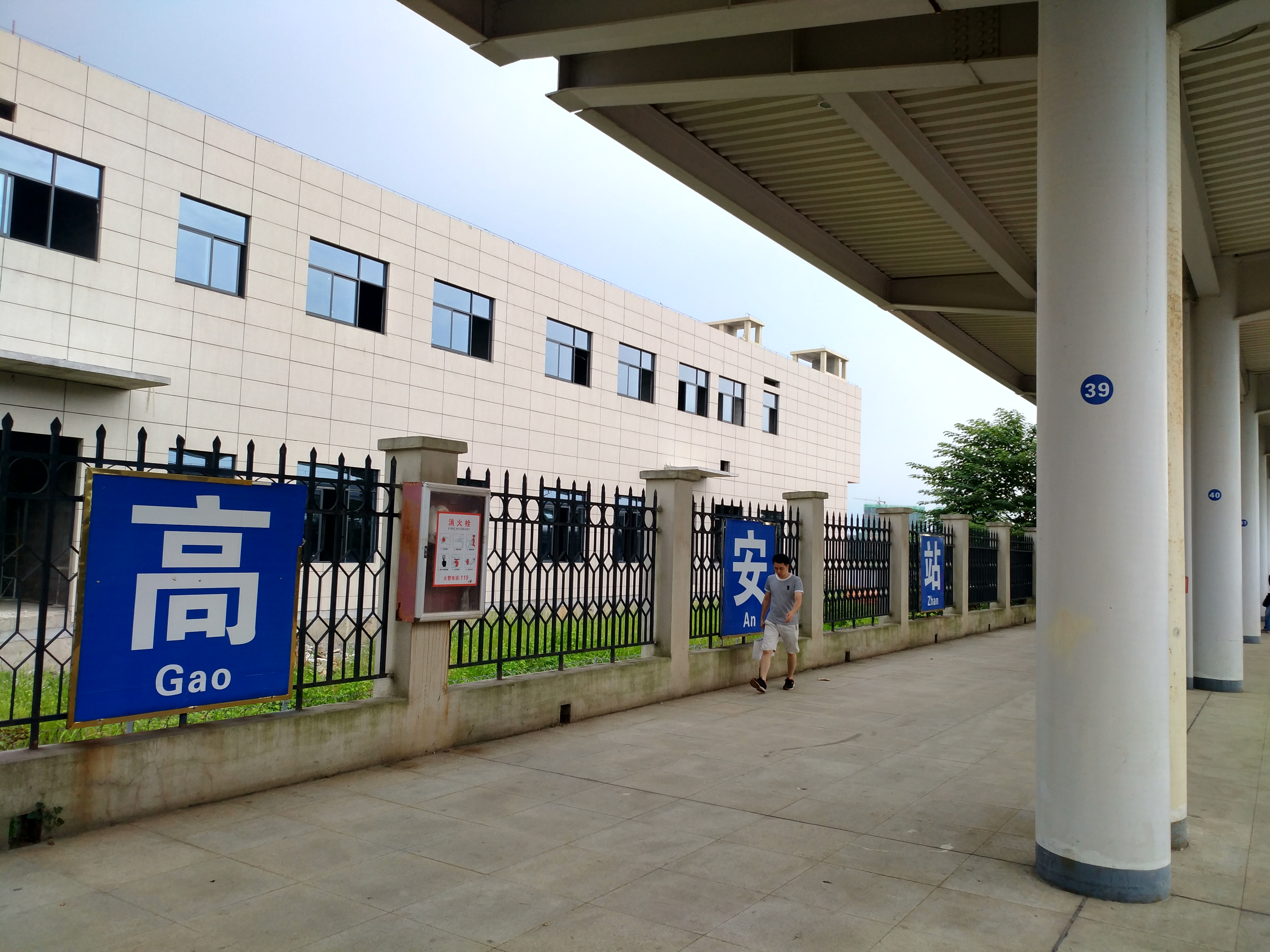 高安站